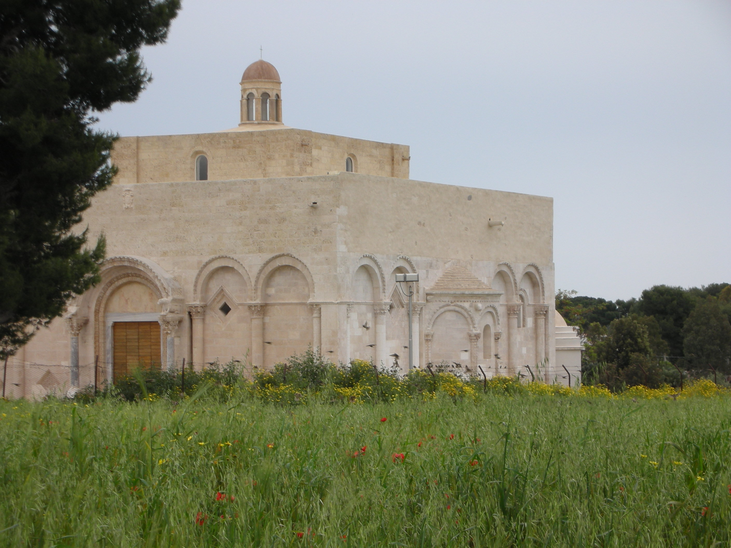 Chevet de la cathédrale Santa Maria Maggiore de Siponto (Pouilles)